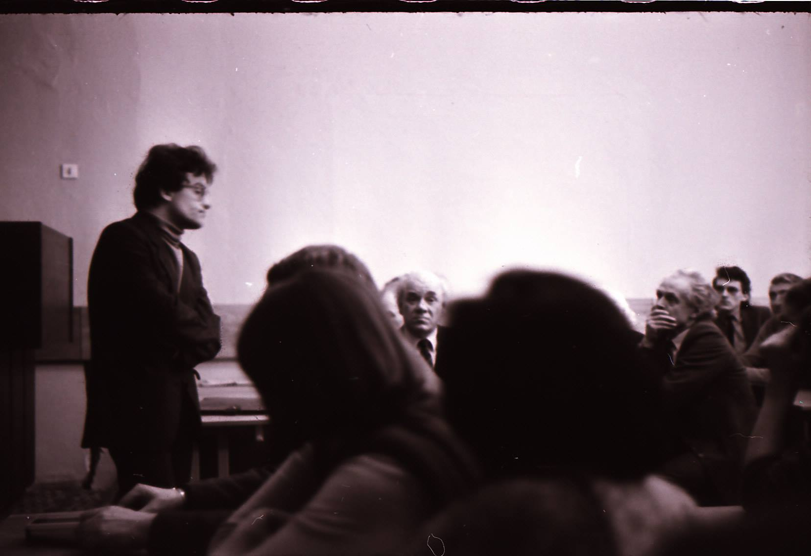 Diskusijų klube Kultūra ir istorija, 1988-01-20. Romualdo Ozolo nuotrauka.